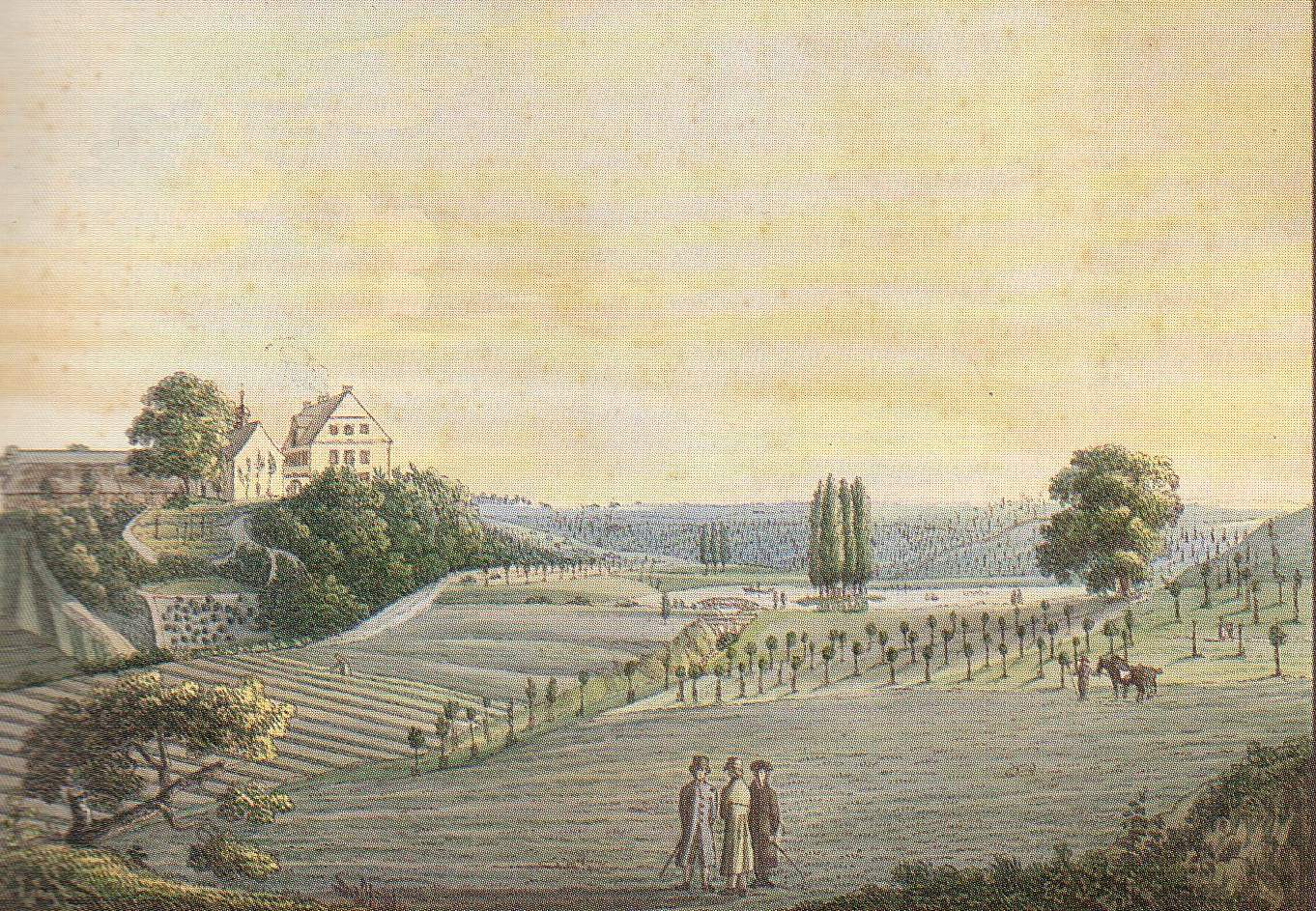 Glüsig close Althaldensleben